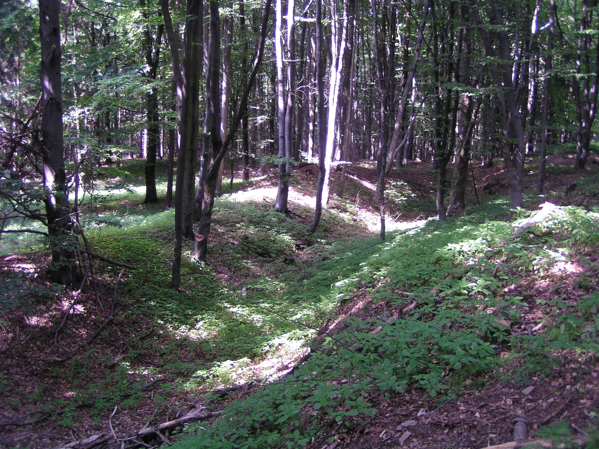 příkop v lese v k.ú. Budíškovice, pozůstatek zaniklého hradu Krumvald ze 14. stol.